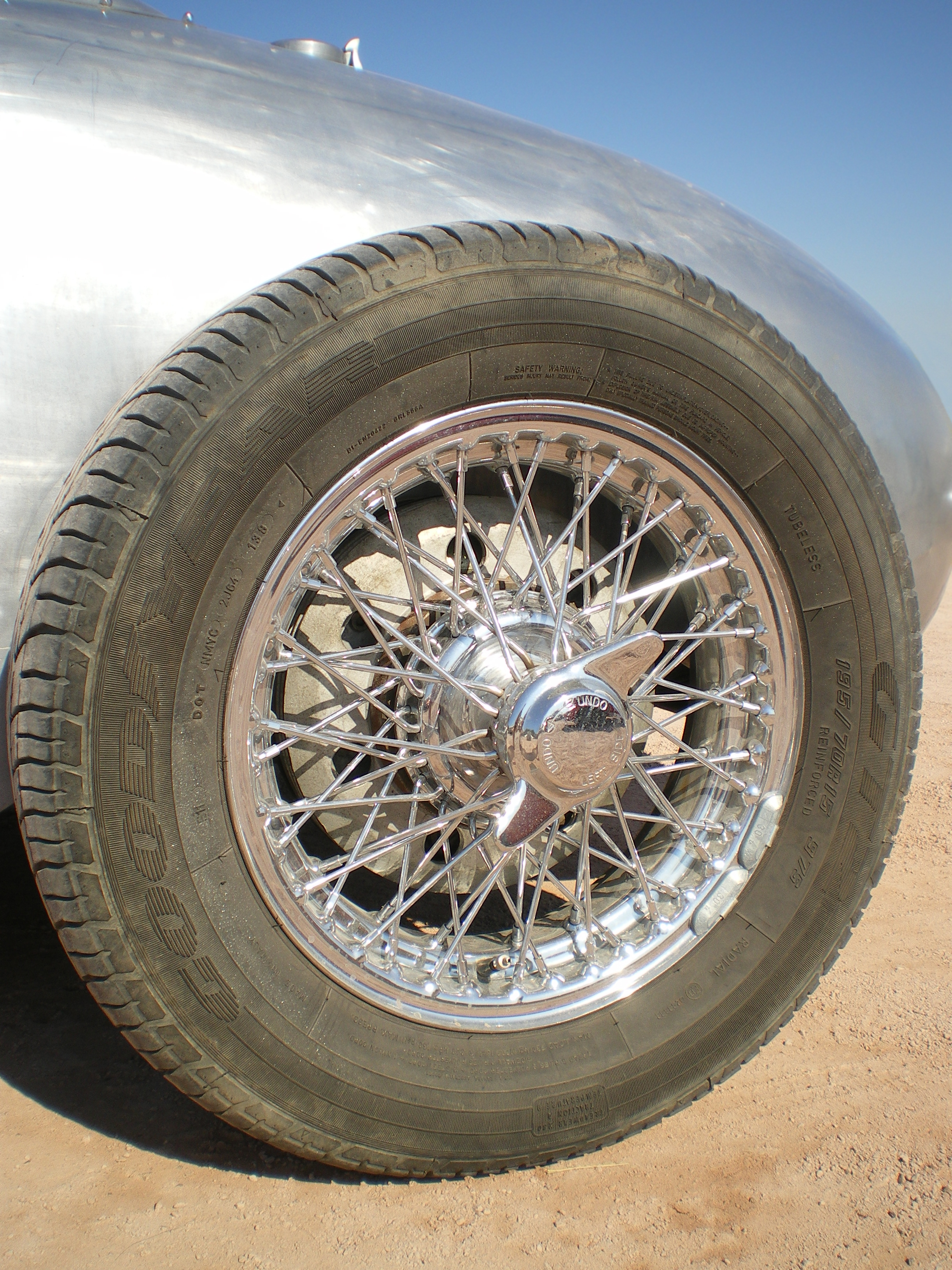 Belle roue chromée à rayons d'une monoplace Talbot.